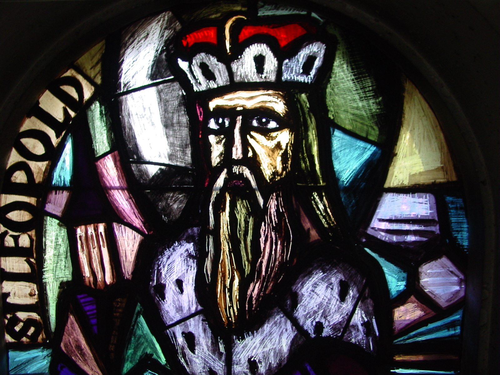 Kirchenfenster von Leopold III. in der Pfarrkirche Liesing (Wien 23) Bild von mir selbst aufgenommen im Sommer 2005